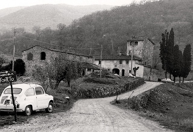 Una delle prime foto scattate al Forteto